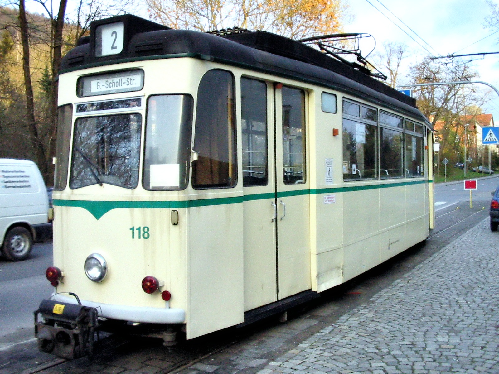 Triebwagen 118 der Jenaer Nahverkehrsgesellschaft am 14. November 2004, endgültig abgestellt am Streckenende in Jena-Ost